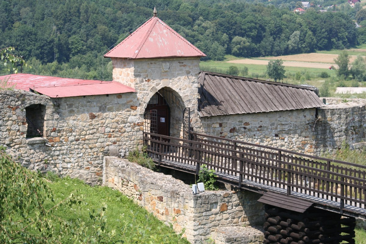 Zamek dobczycki